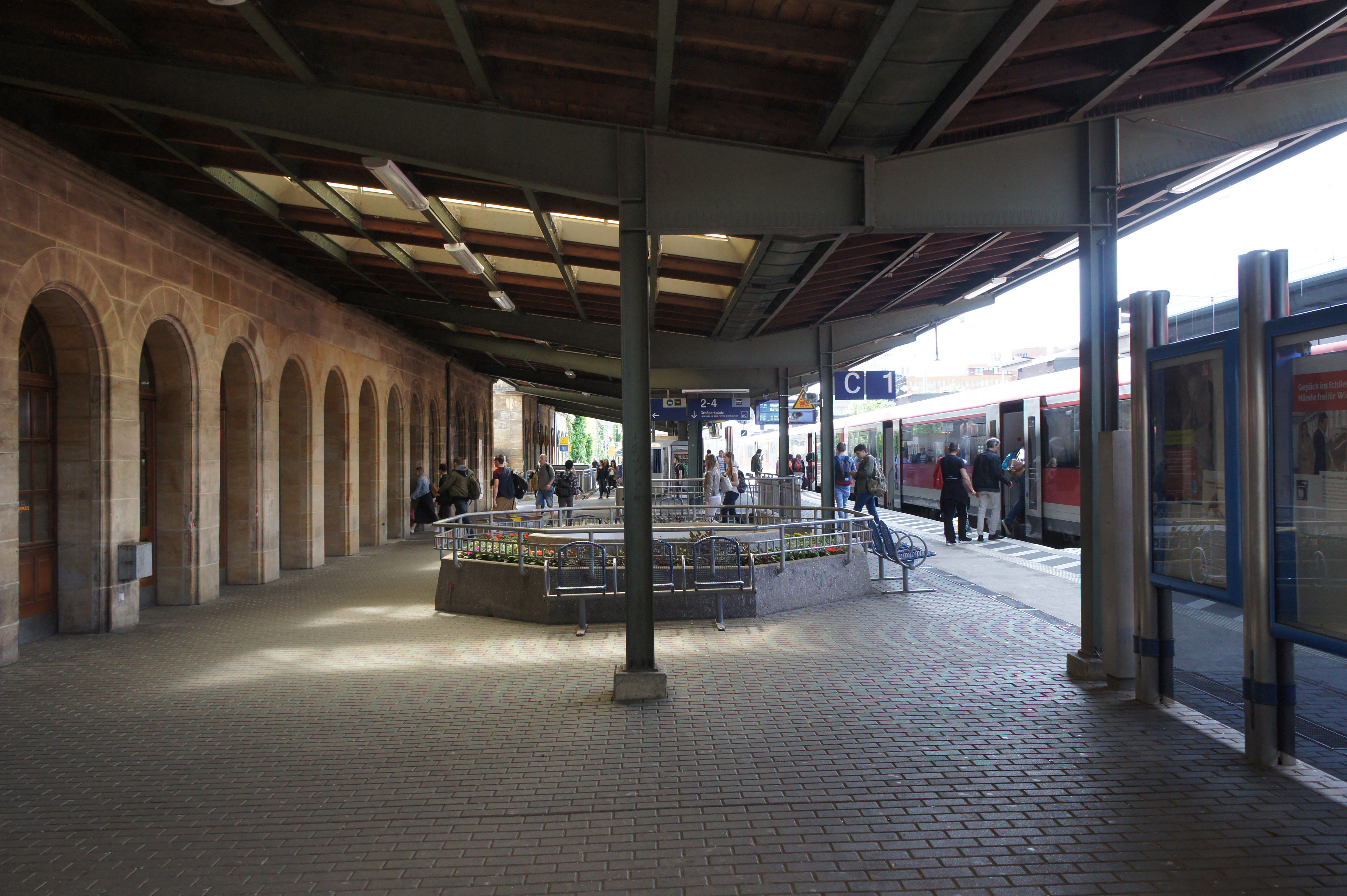 Bahnhof Erlangen: Bahnsteig und Eingang zur Bahnhofshalle